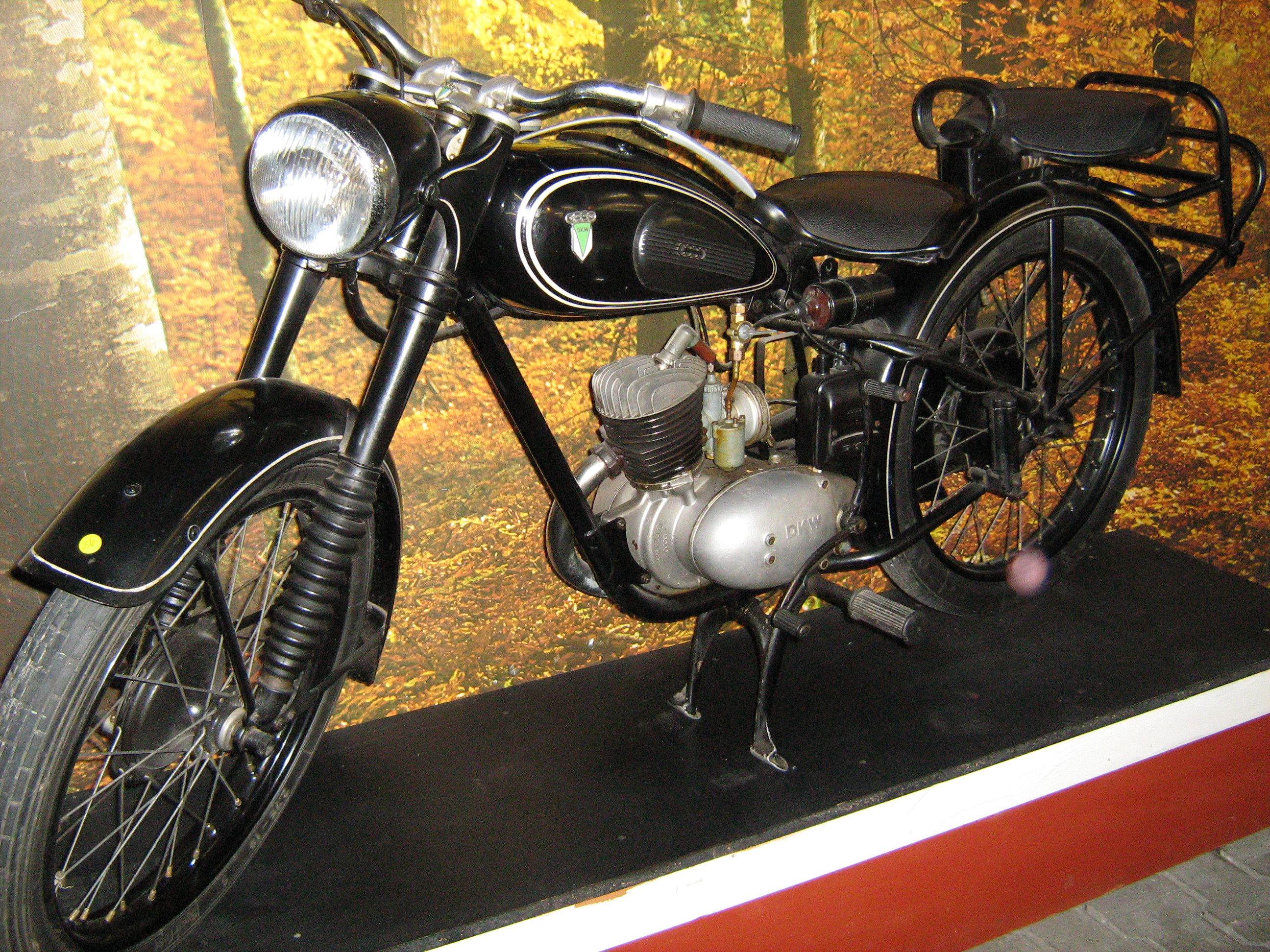 Motorrad DKW RT 125, Bj. 1951, 122 ccm, 4,75 PS, 80 km/h